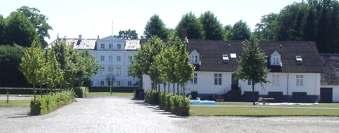 Gårdspladsen på Lilliendal